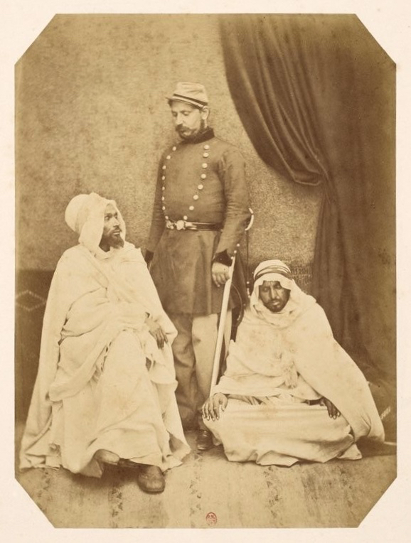 Saïd, Kaïd des Ouled Sidi l' Abdely ; un interprète du bureau arabe ; Mohammed ben Ali, Kaïd des Beni Ournid, Tlemcen (Moulin phot.).